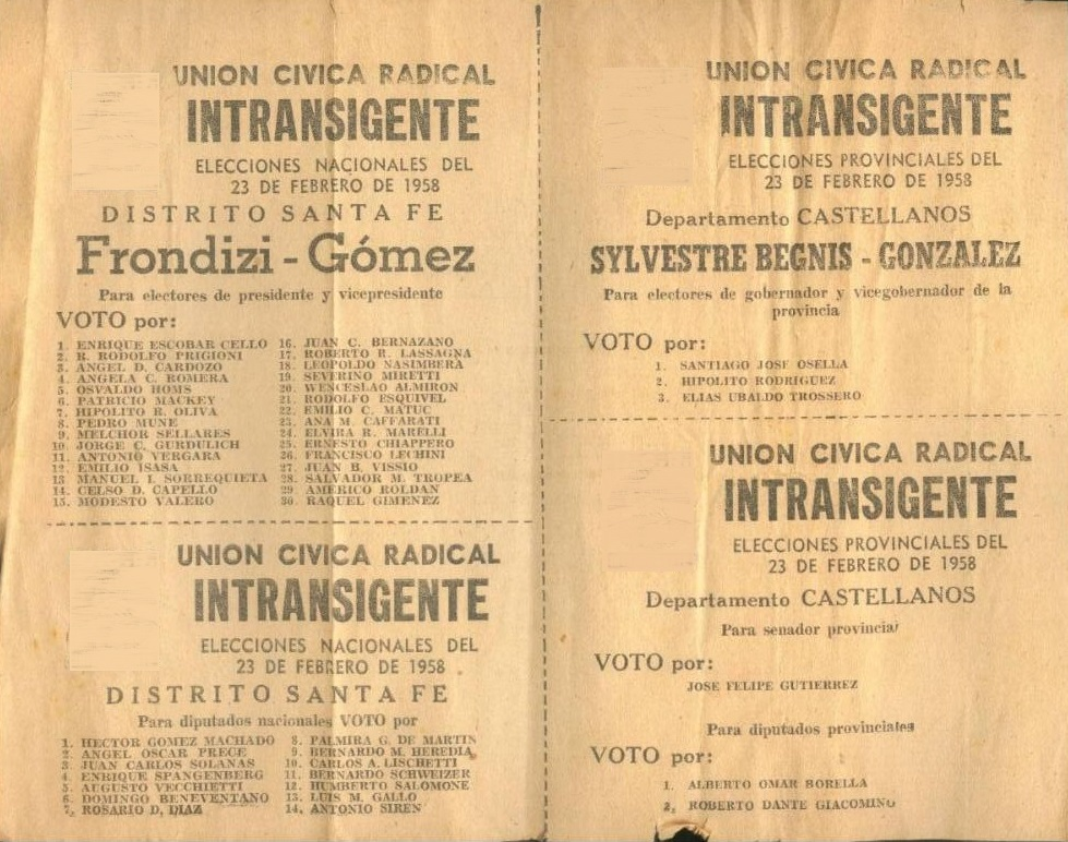 Boleta electoral de la Unión Cívica Intransigente para las elecciones de 1958 con la fórmula Frondizi-Gomez. Distrito Santa Fe.